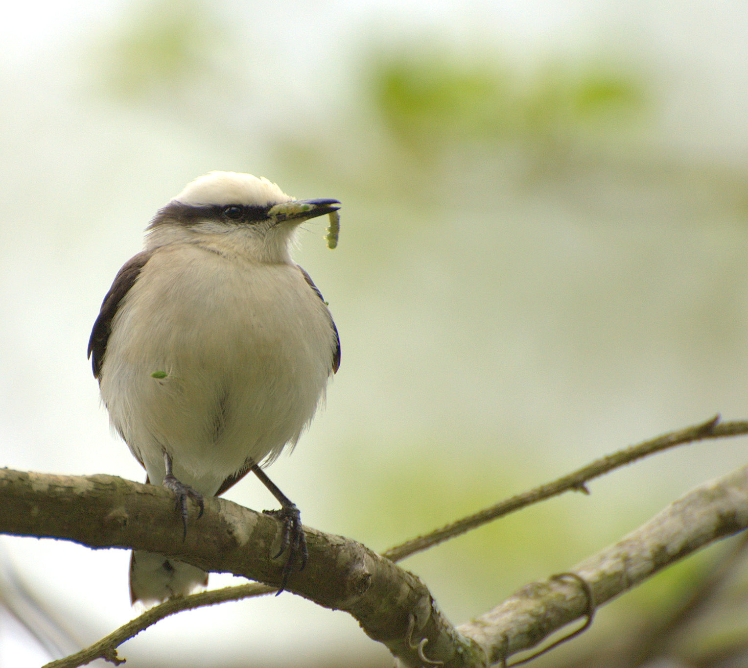 Horto Florestal de São Paulo Masked Water-tyrant (Fluvicola nengeta)